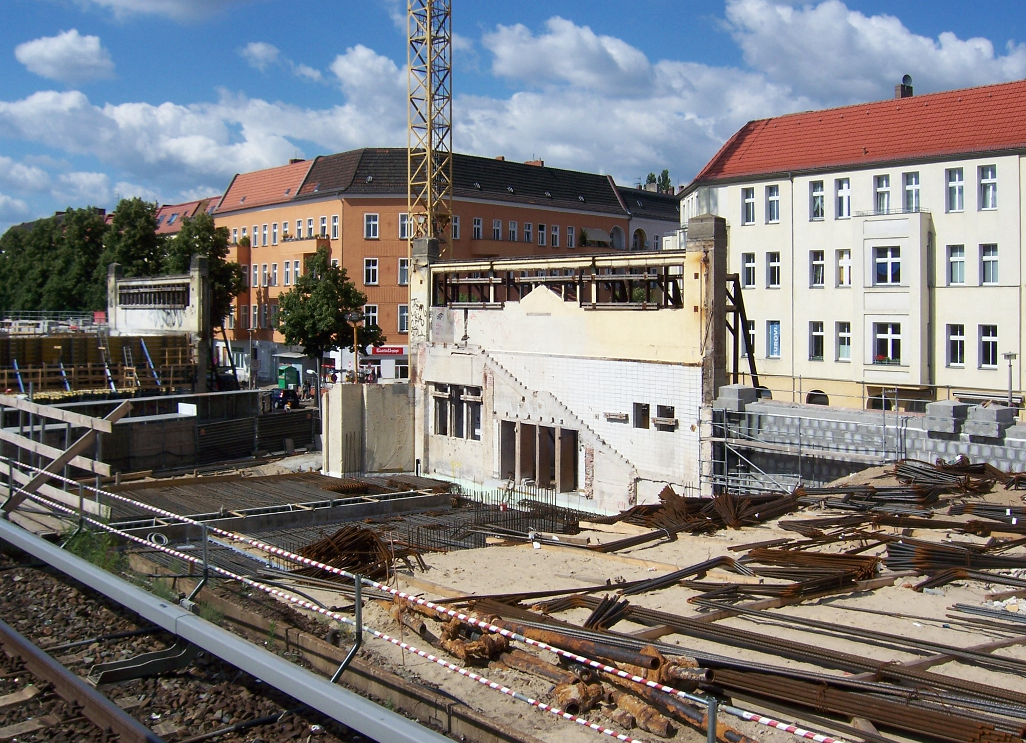 Umbau des Bahnhofs Berlin-Baumschulenweg mit abgefangenen denkmalgeschützten Fassaden